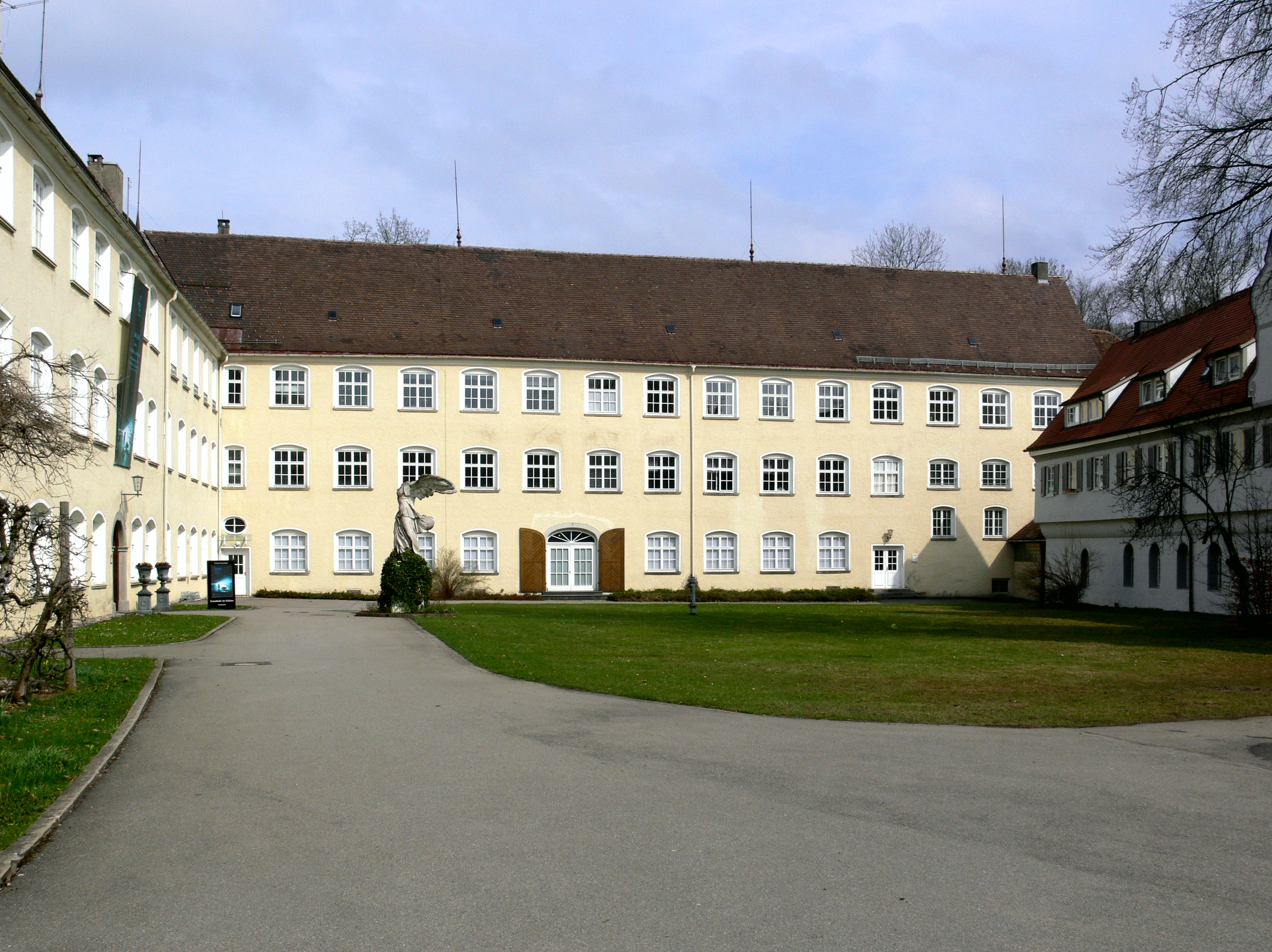 Isny im Allgäu, ehem. Benediktinerkloster St. Georg („Schloss Isny“)